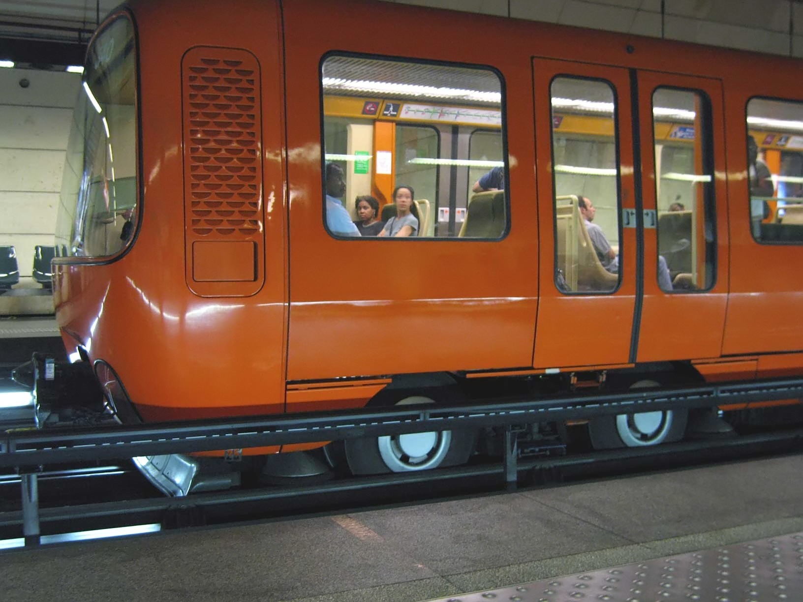 Rame de la ligne D , détail de l'essieu, Lyon, France